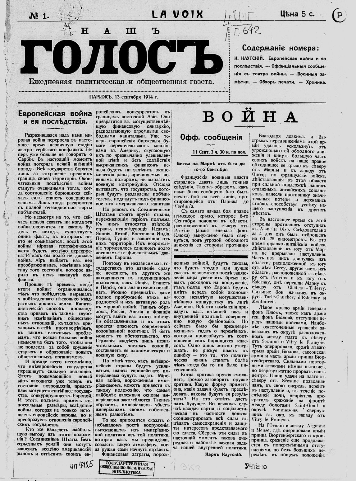 Наш Голос : ежедневная политическая и общественная газета. - Париж, 1914-1915